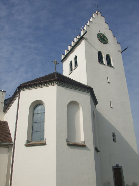 Pfarrkirche St. Blasius, Burgweiler, Gemeinde Ostrach, Landkreis Sigmaringen, Baden-Württemberg Außenansicht